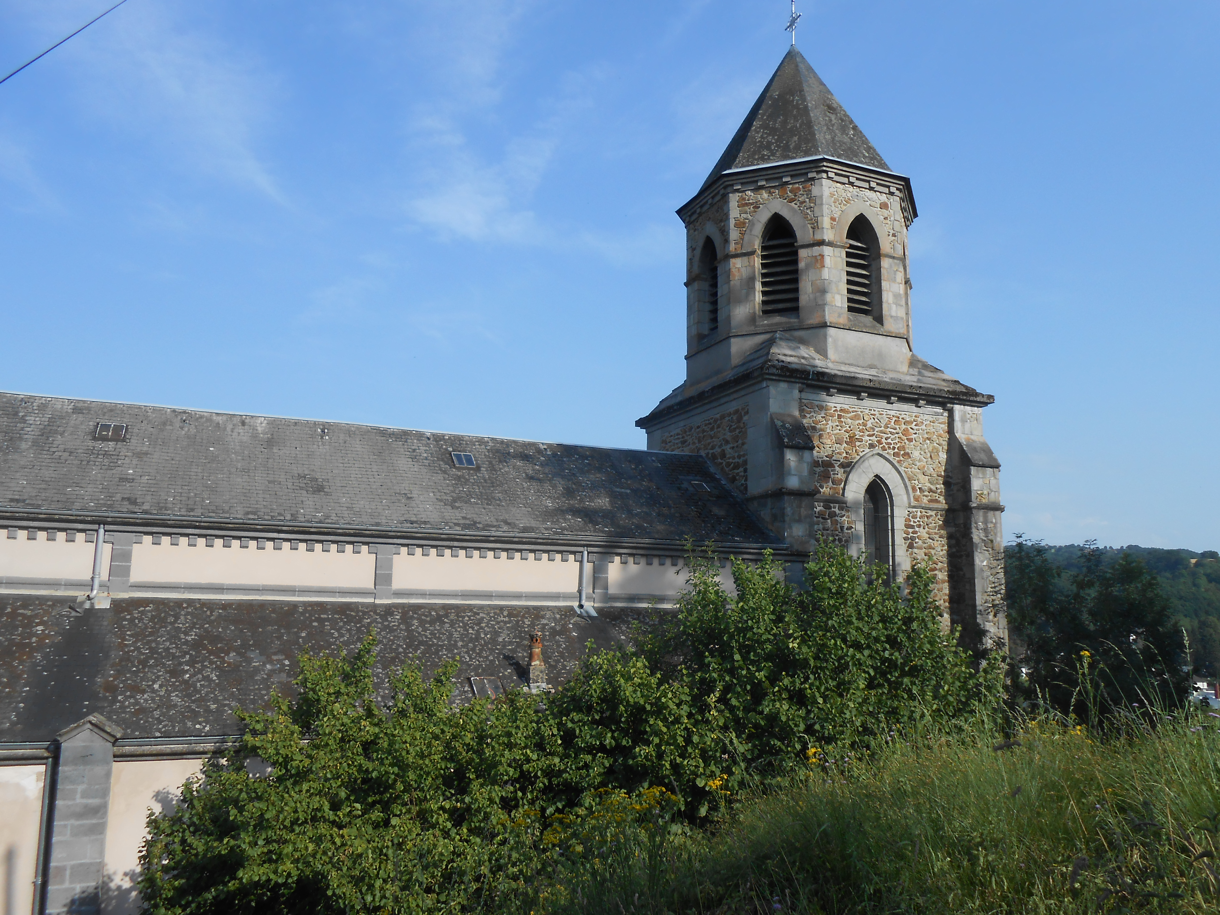 Eglise de Pontaumur.